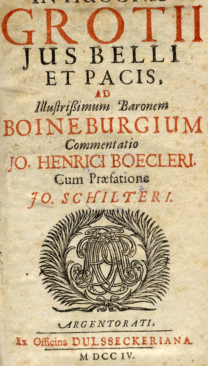 Boeckler, Johann Heinrich (1611-1672): In Hugonis Grotii Jus Belli Et Pacis Mit Vorwort von Johann Schilter